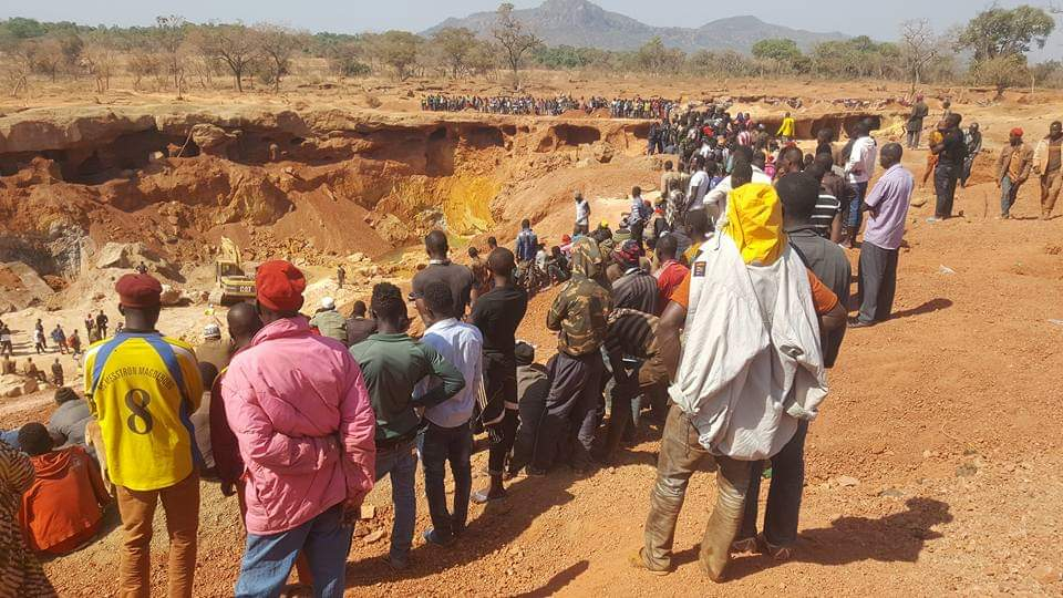 ߞߏ߲ߞߏߜߍ ߕߋ߬ߟߋ߫3/2019 ߣߏߙߊߛߏߓߊ߫ ߘߊ߲߬ߡߊ߲߬ߝߍ߬ߓߊ ߡߍ߲ ߘߊ߫ ߕߌߢߍߟߌ߫ ߢߍ߫ ߞߊ߬ ߡߐ߱ 17 ߞߍ߫߫߸ߝߎ߬ߙߋ߬ߣߍ߲ ߘߌ߫߫